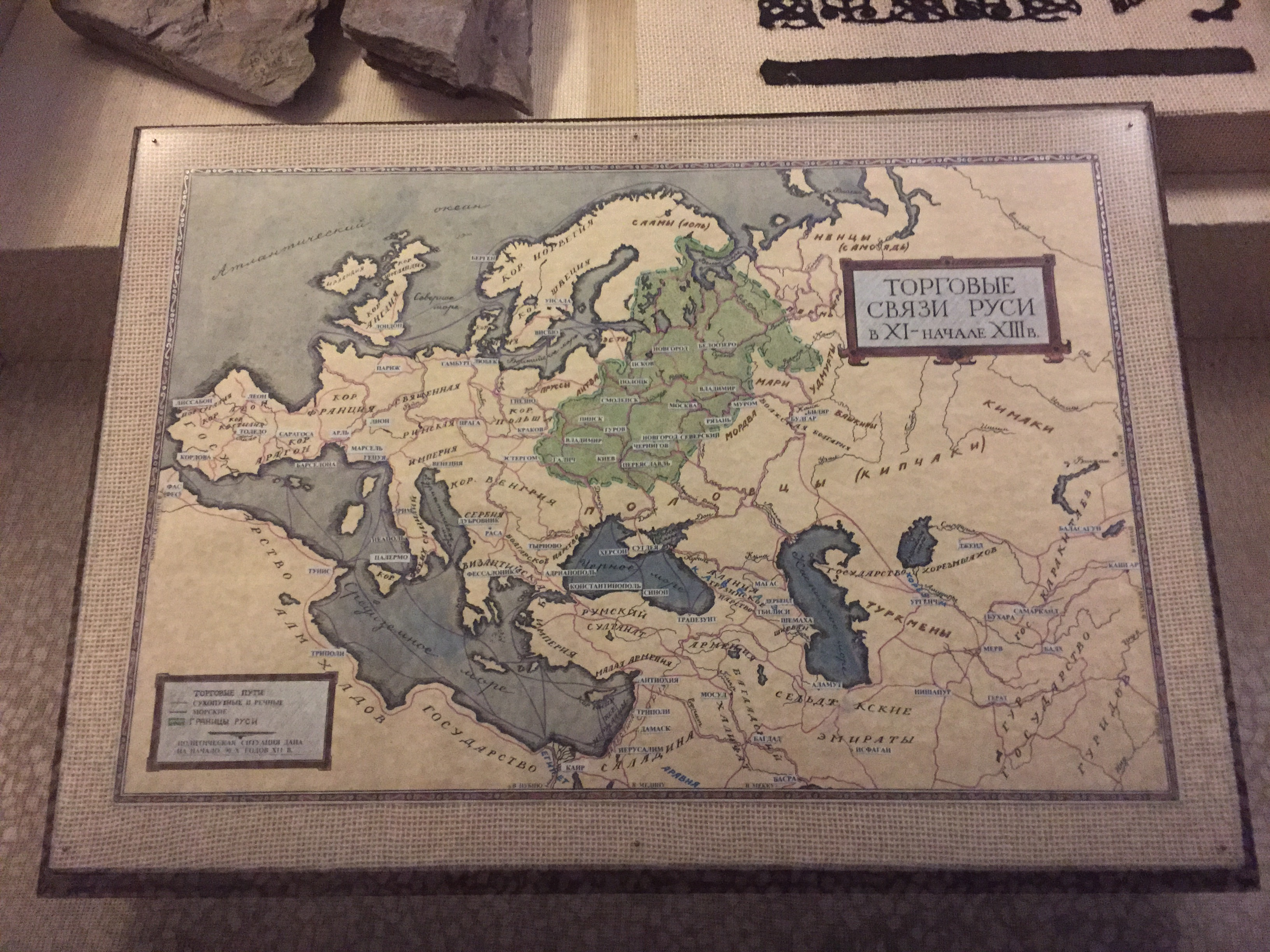 Карта торговых связей Руси в XI - начале XIII века (Государственный исторический музей, Москва).